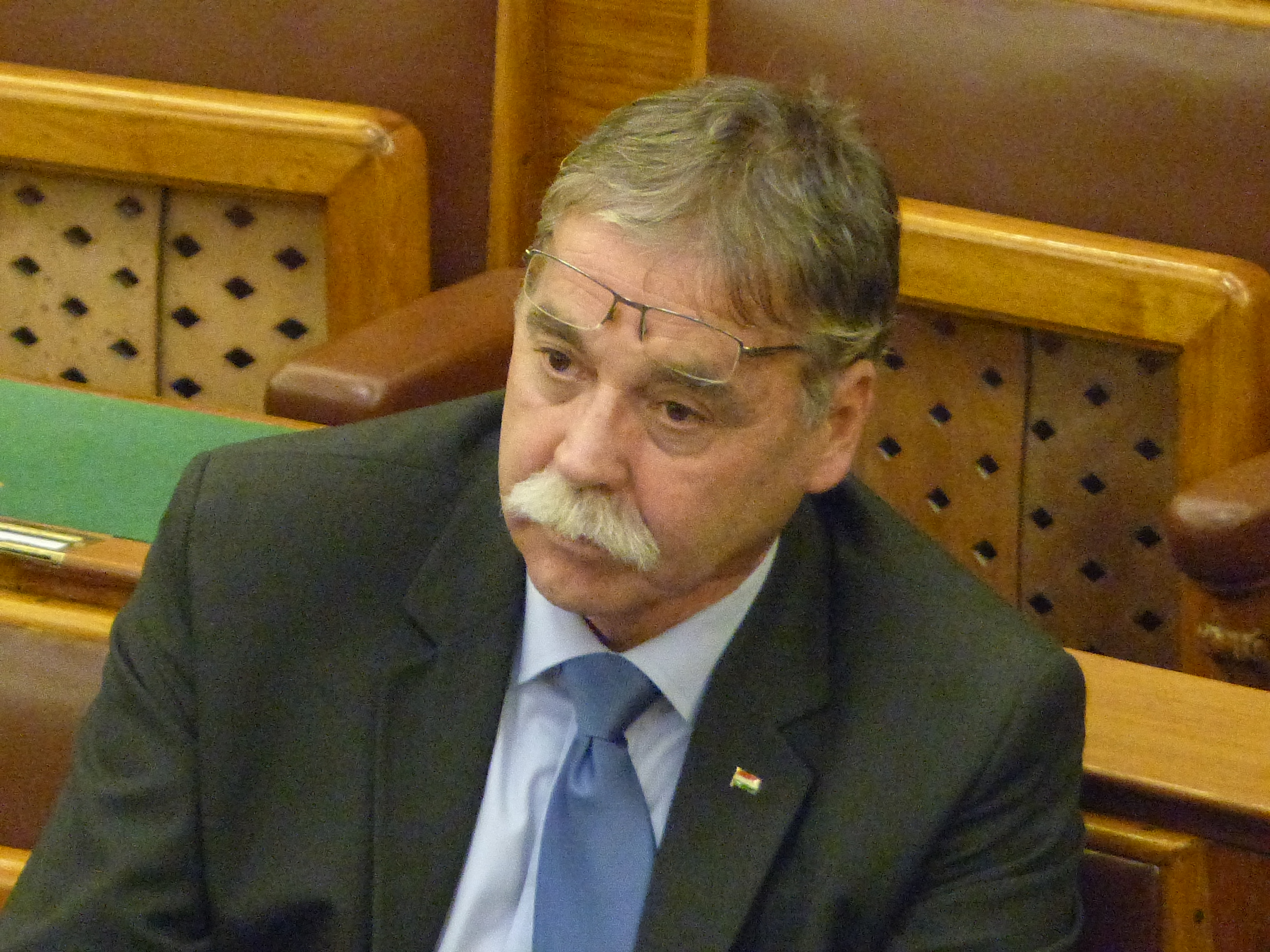 Csenger-Zalán Zsolt országgyűlési képviselő. A felvétel 2016. november 8-án készült az Országházban. Az Országgyűlés ezen a napon szavazott az Alaptörvény 7. módosításáról.